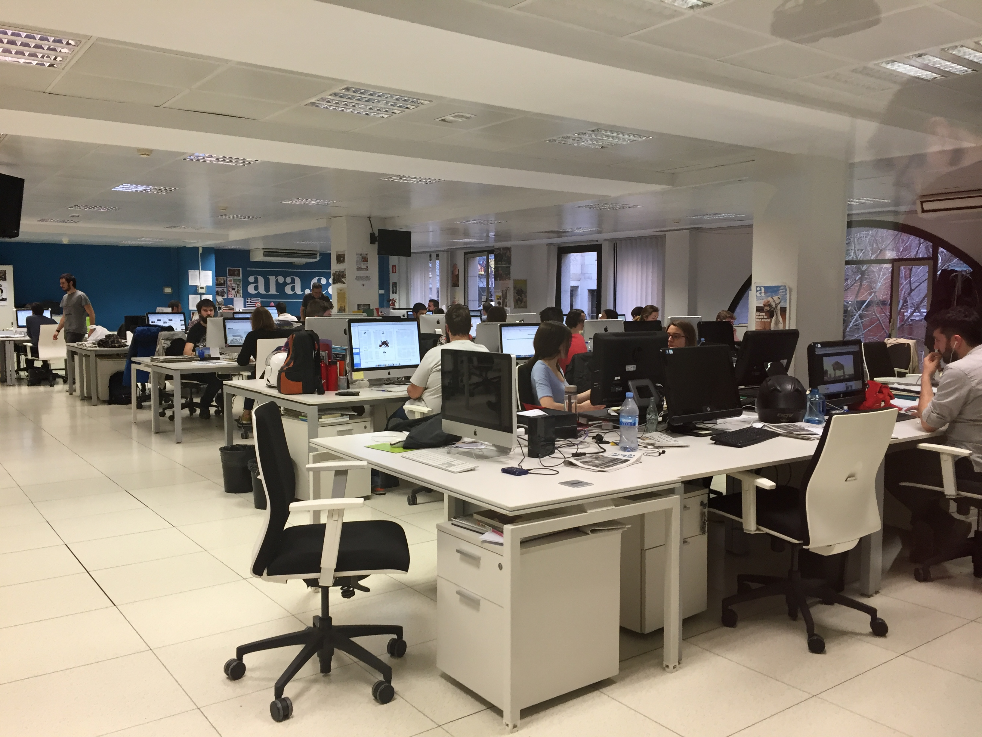 redacció diari ara 2016